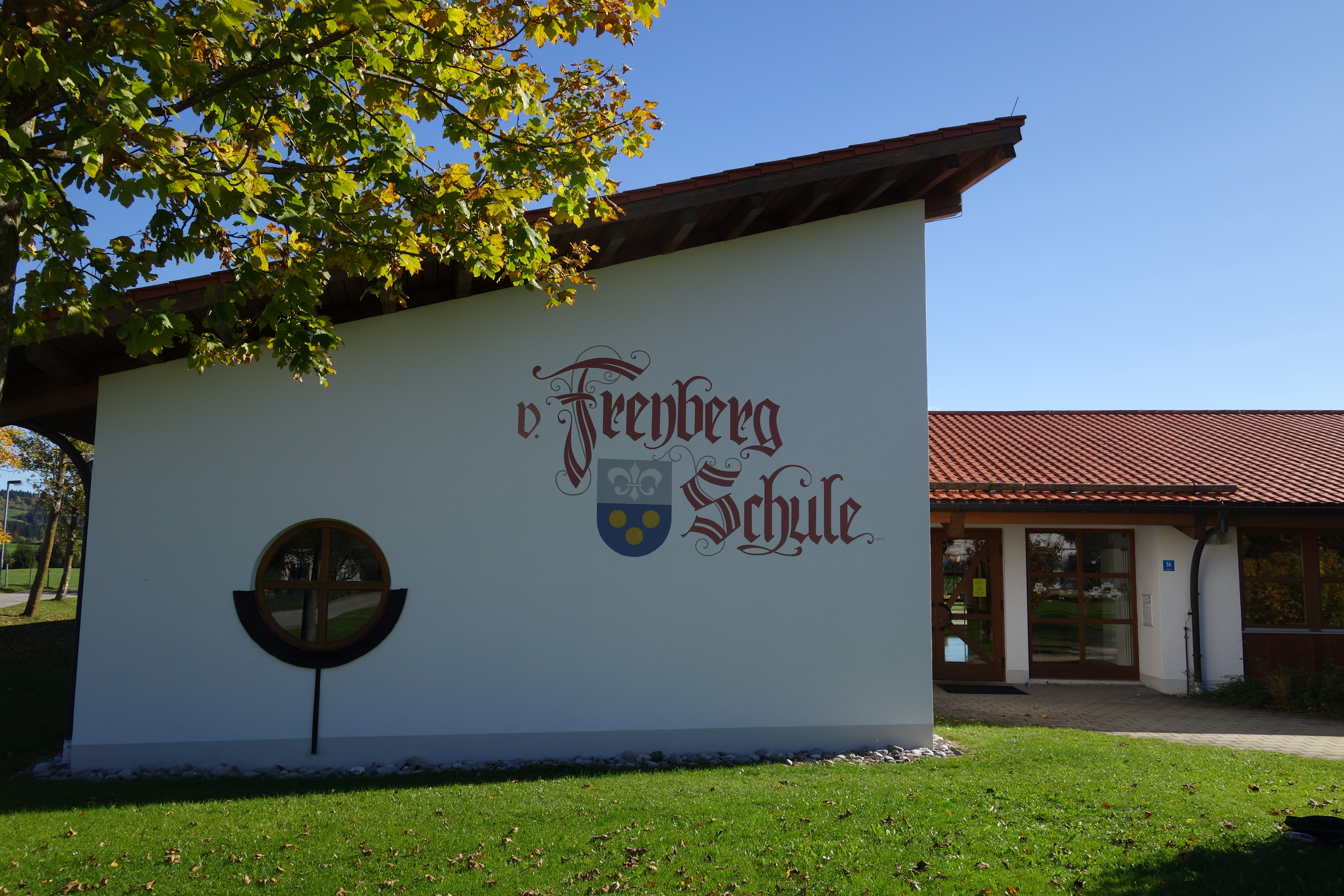 Die Von-Freyberg-Grundschule in Eisenberg-Speiden trägt Namen und Wappen des Adelsgeschlechts von Freyberg, das in der Umgebung herrschte, und deren Burg Hohenfreyberg sich auf der Gemarkung der Gemeinde Eisenberg befindet.